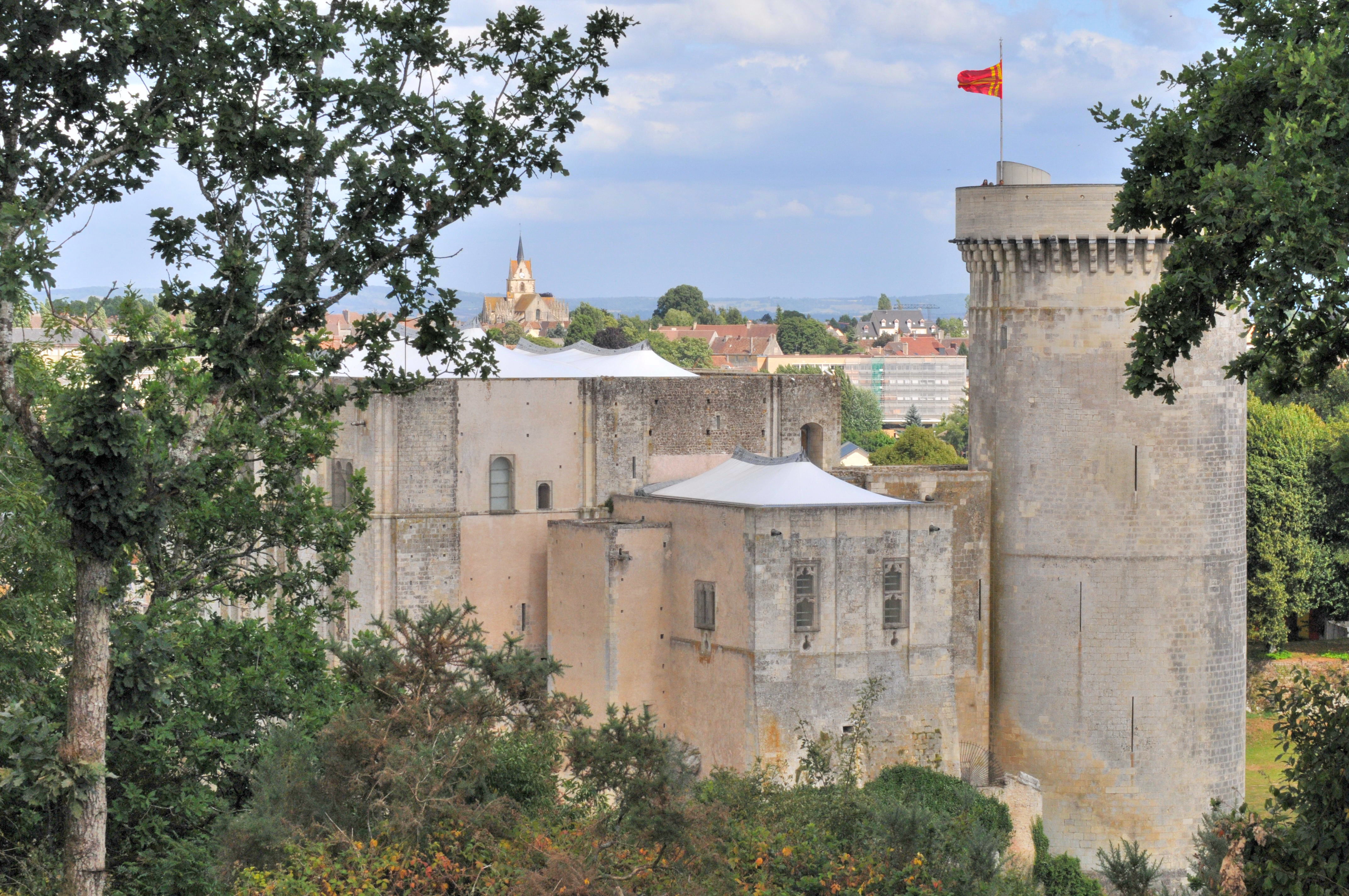 Chateau de Falaise Calvados